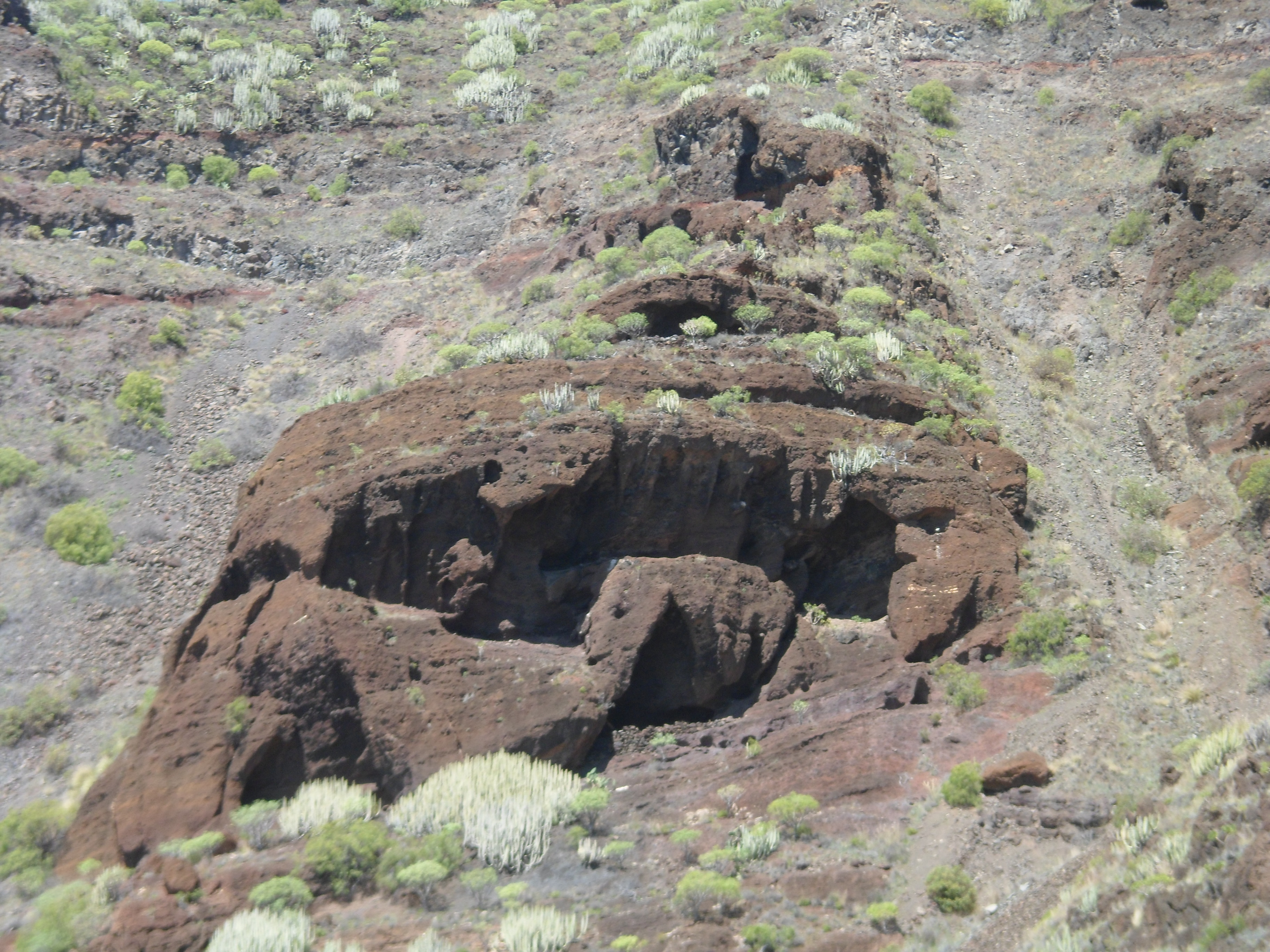 Cuevas de guanches en Anaga, Tenerife.